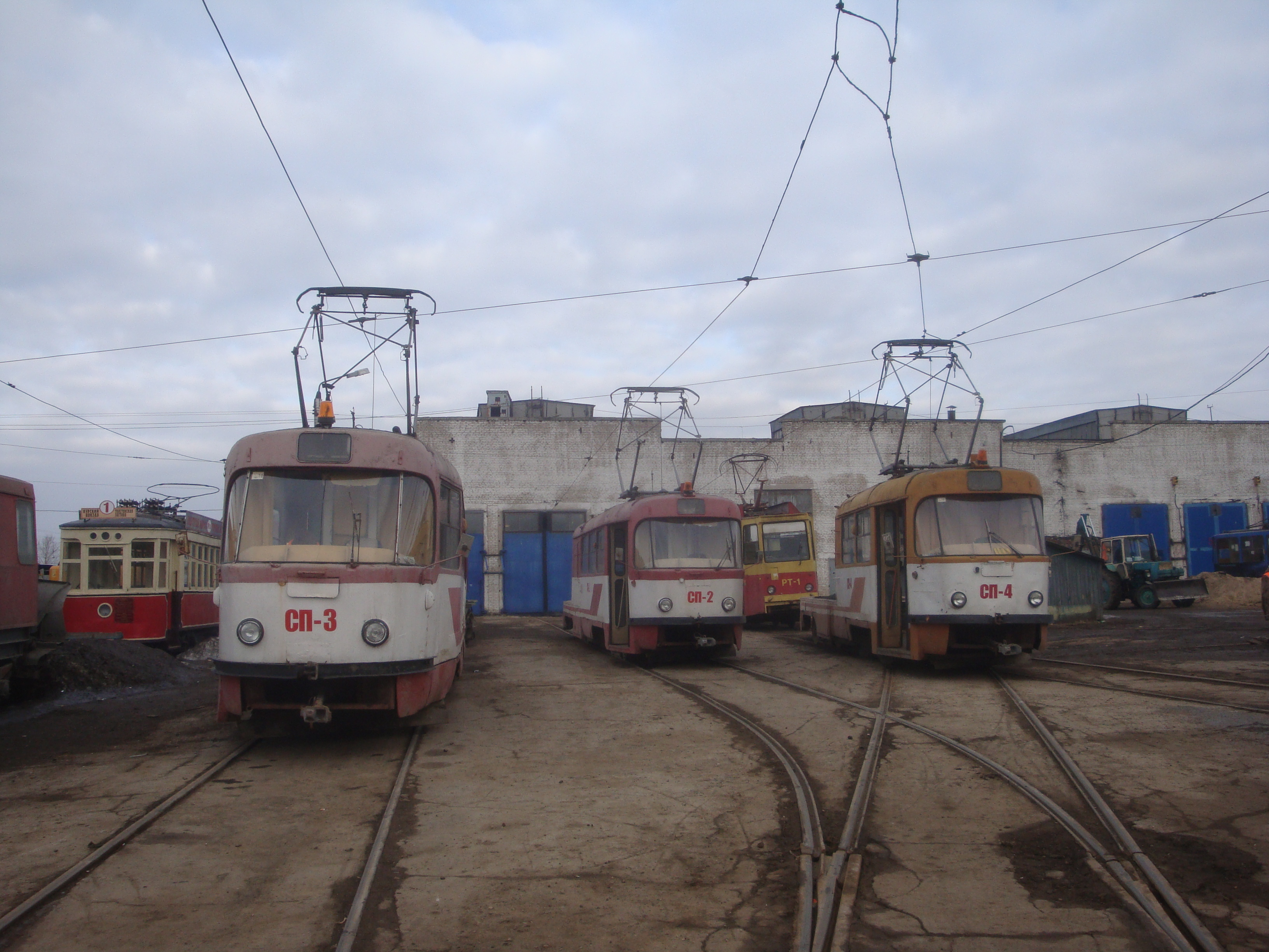 Грузовые вагоны, рельсотранспортер и музейный вагон в одном из тульских трамвайных депо.